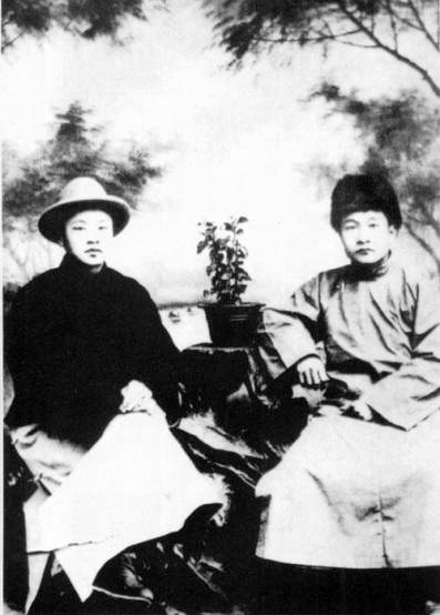 1925年l0月，中共北方区委选派乌兰夫到苏联莫斯科中山大学深造，出发前乌兰夫（左）与佛鼎（右）在北京蒙藏学校留影。佛鼎（1905年－1993年1月6日）蒙古族，內蒙古土默特旗公主府村人，中華民國及中華人民共和國政治人物。